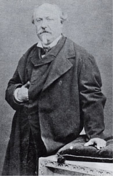 Giuseppe Inzegna, italian mycologist